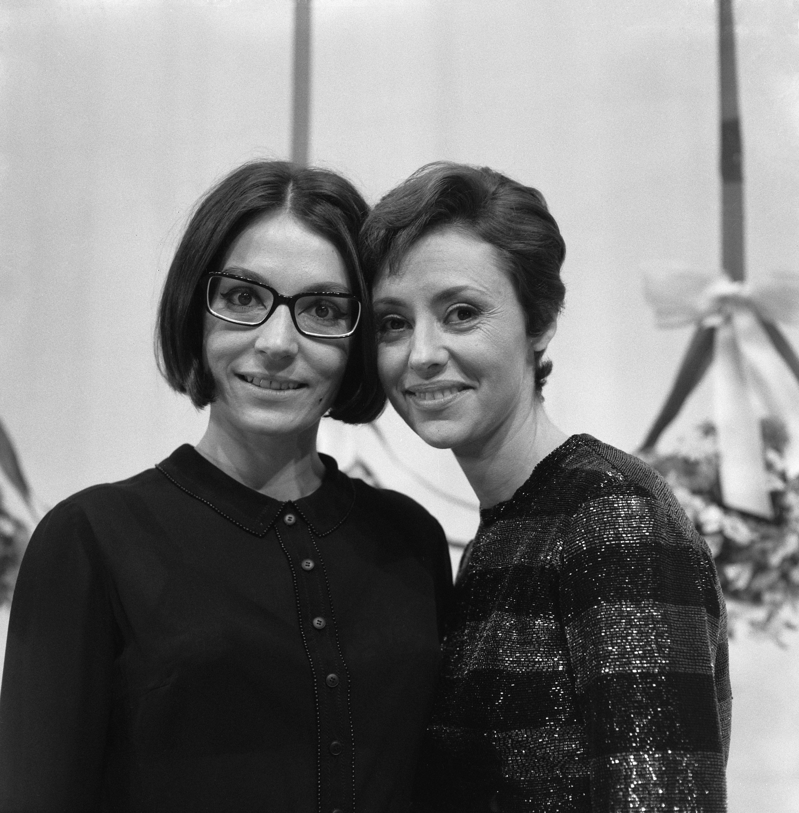 Collectie / Archief : Fotocollectie Anefo Reportage / Serie : [ onbekend ] Beschrijving : Caterina Valente show , opname Carre hier met Nana Mouskouri Datum : 3 juni 1966 Persoonsnaam : Mouskouri, Nana Fotograaf : Kroon, Ron / Anefo Auteursrechthebbende : Nationaal Archief Materiaalsoort : Negatief (zwart/wit) Nummer archiefinventaris : bekijk toegang 2.24.01.03 Bestanddeelnummer : 919-2225